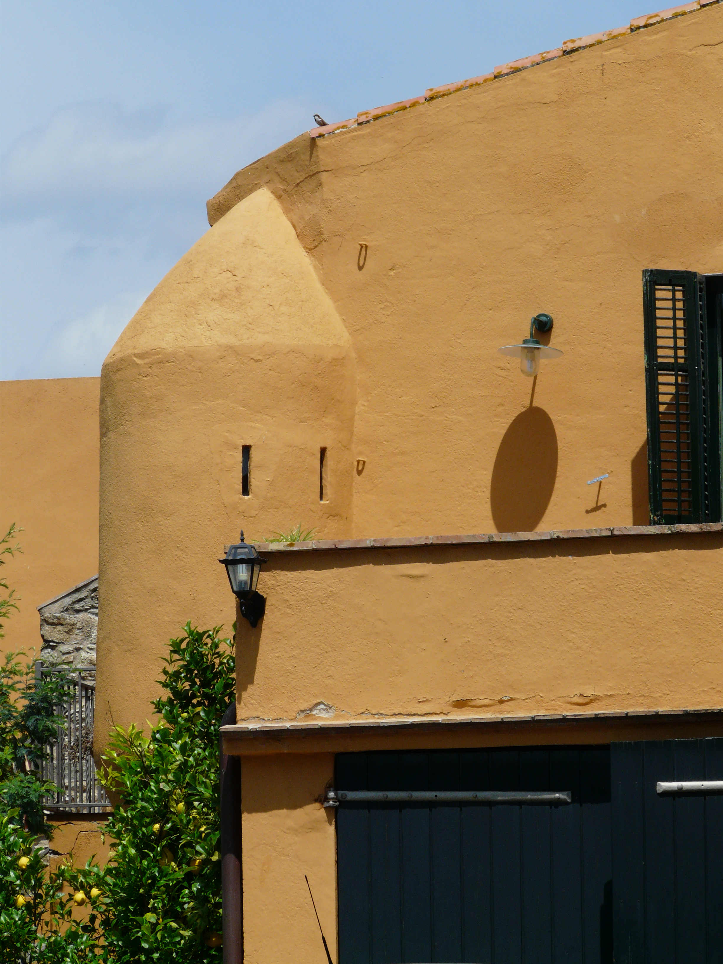 Mas Falgàs (Vilajuïga) Object location42° 19′ 36.96″ N, 3° 05′ 24.48″ E